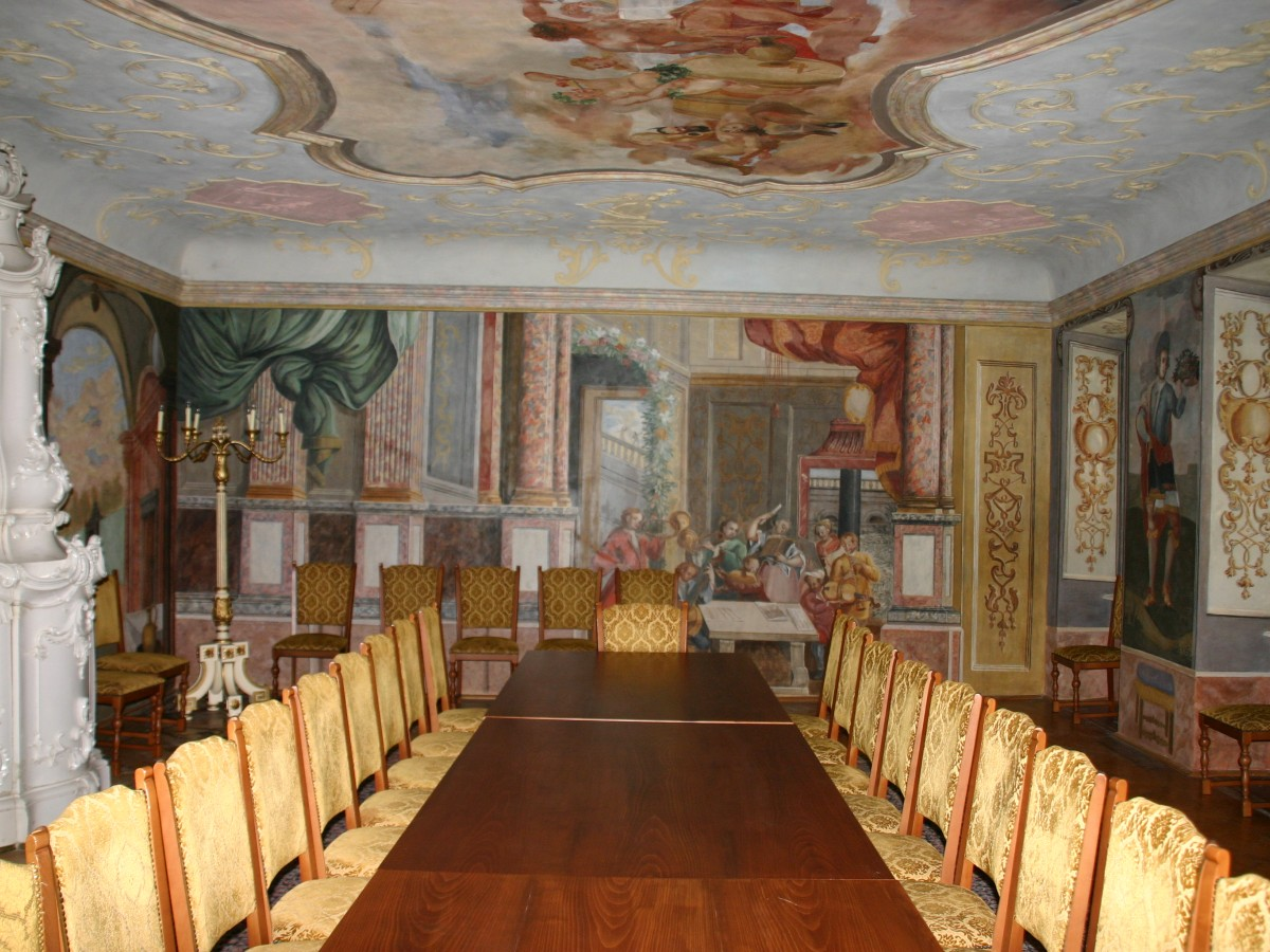 Pitten Freskensaal im Pfarrhof (Bild 1)